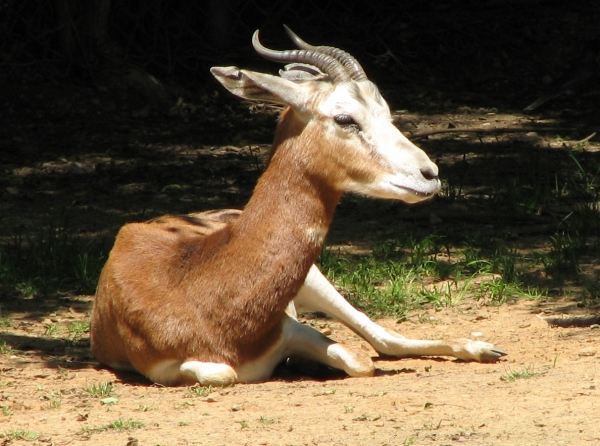 Mhorr Gazelle